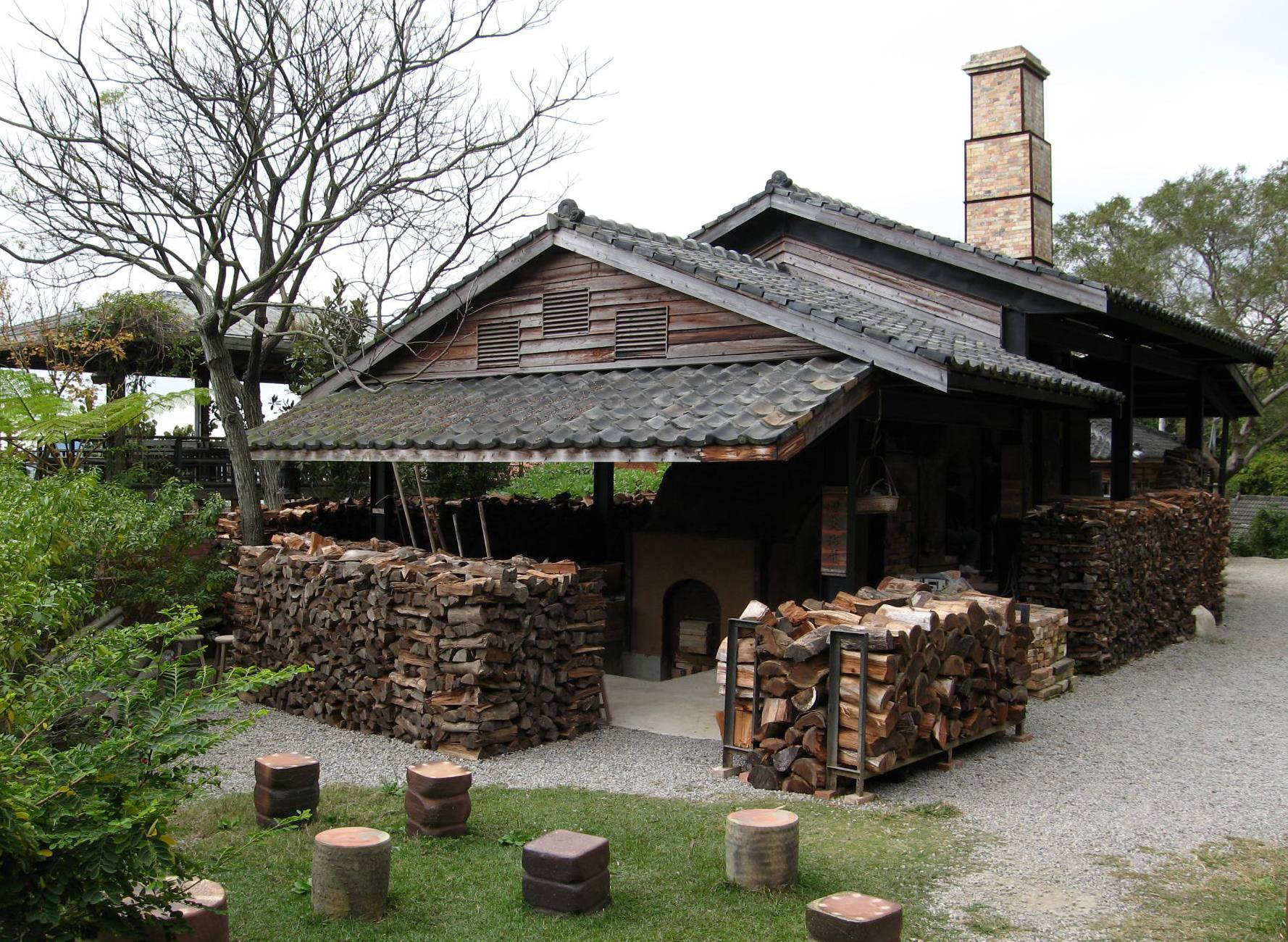 中文（台灣）: 華陶窯登窯及相思木柴